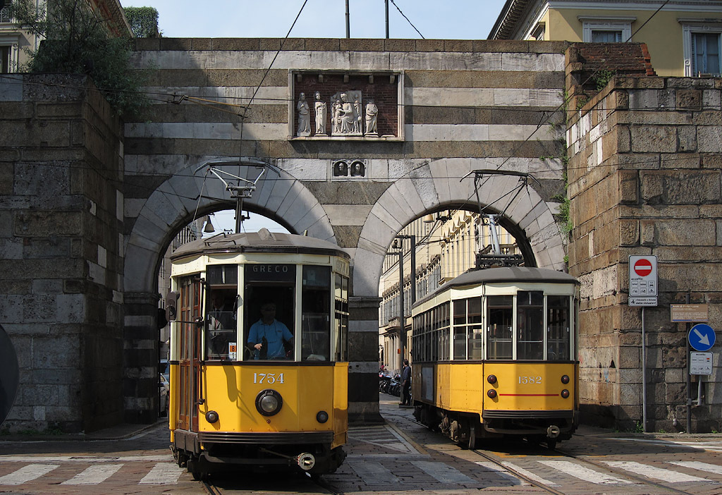 Incrocio fra le vetture tranviarie 1754 e 1582 dell'ATM di Milano sotto gli Archi di Porta Nuova.